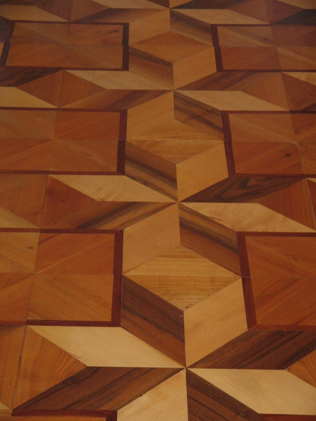 Bogenšperk, Burg in Nahe von Litija, Slovenija Quelle: eigene Aufnahme 01 Okt. 2005 Fotograf: Janez Novak, Ljubljana, Slovenija